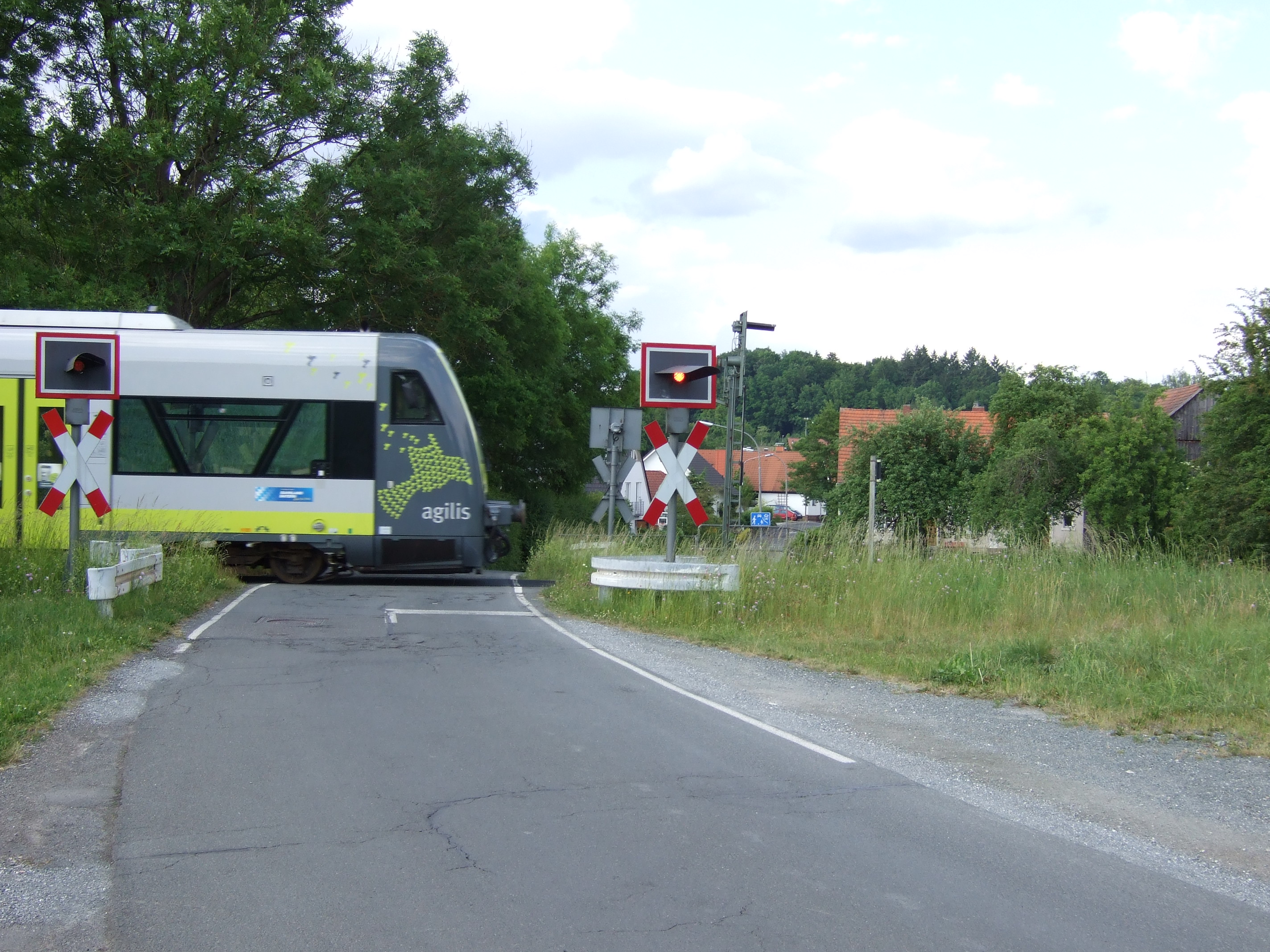 Bahnübergang Bayreuth Wunaustraße